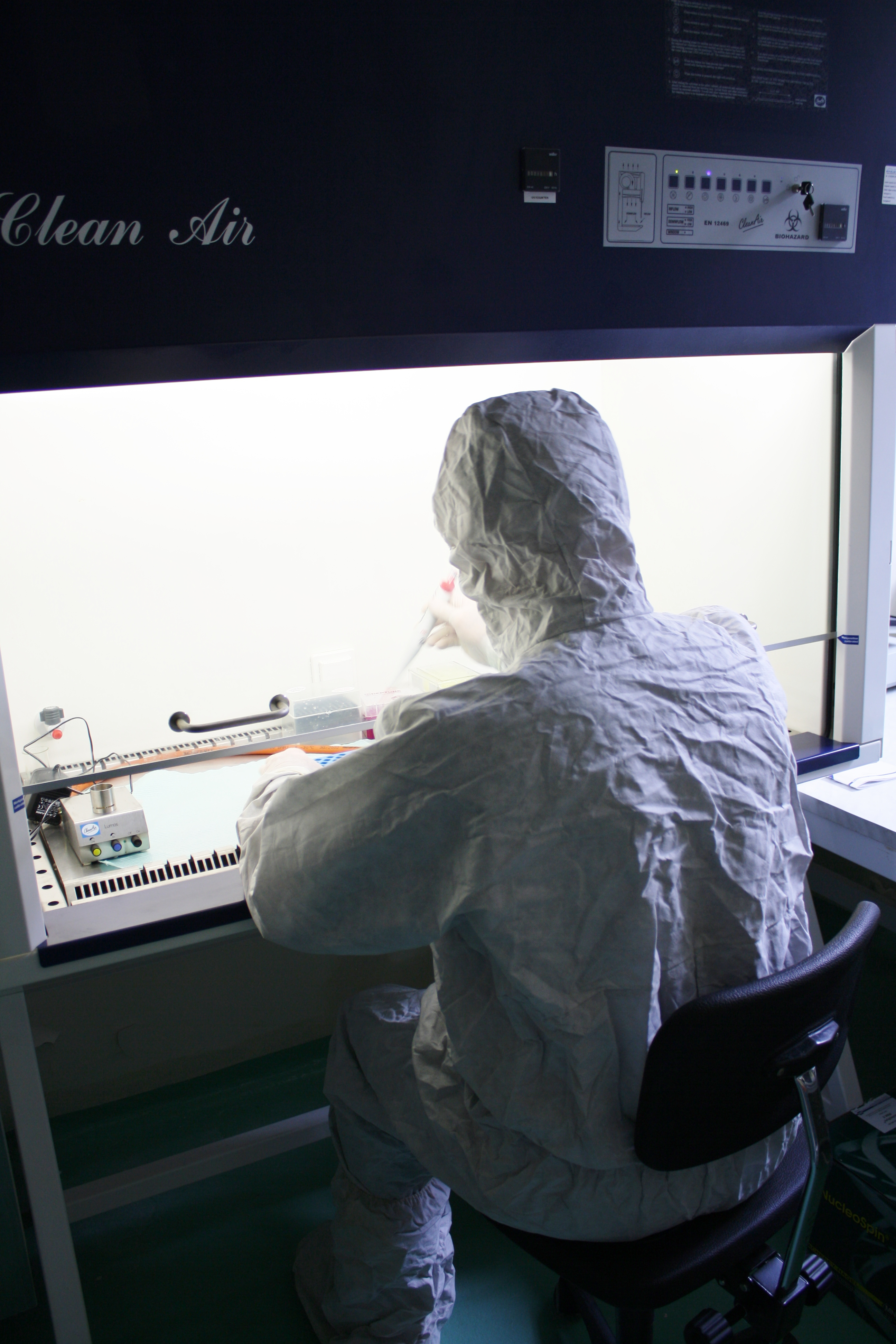 Na speciálních oddělení se pracuje i s toxickými látkami